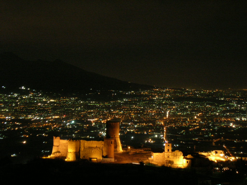 Veduta notturna del castello di Lettere